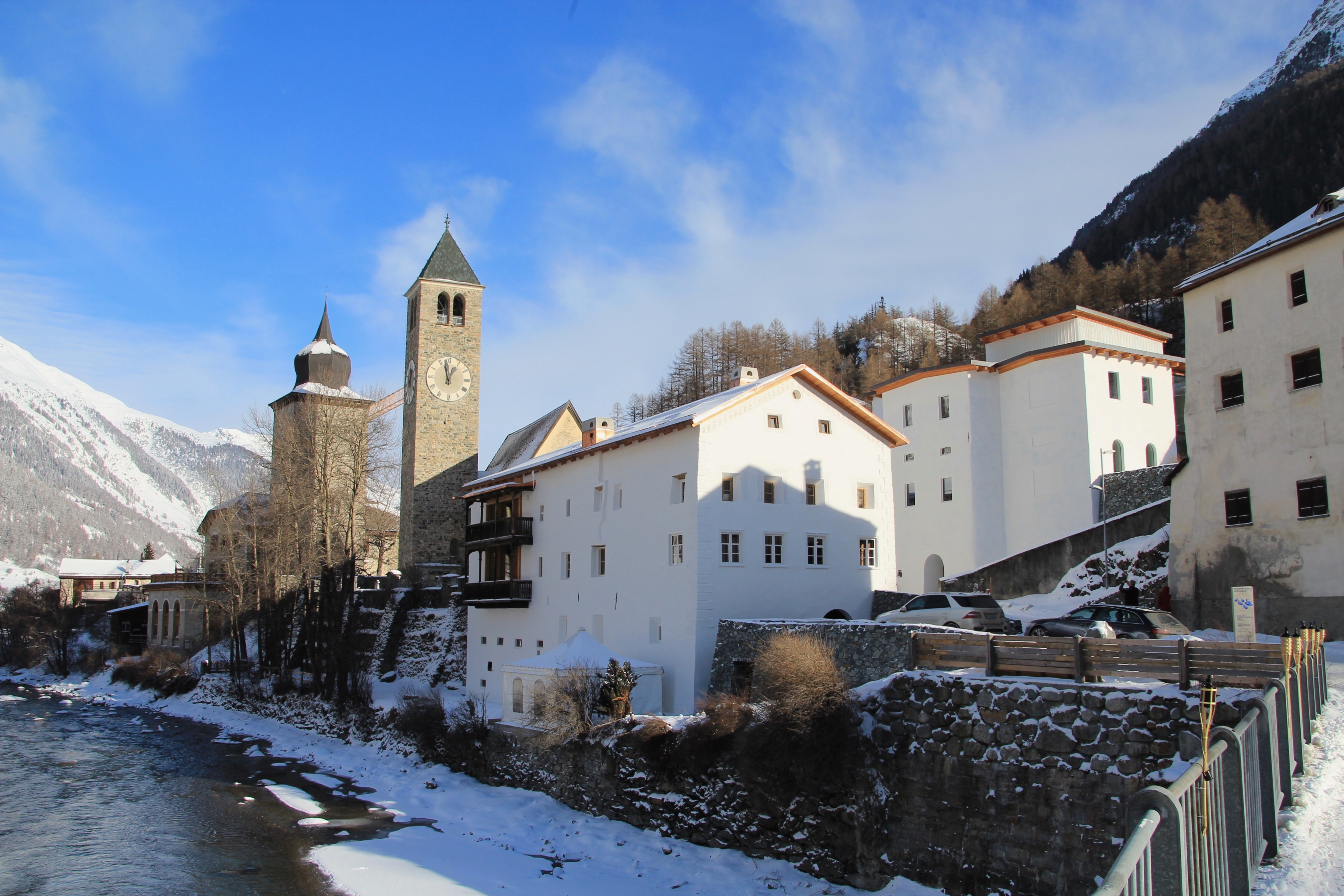 Muzeum Susch Die Bieraria Veglia in der Mitte, rechts davon die Bieraria. Links davon die ref. Kirche, ganz links der Plantaturm